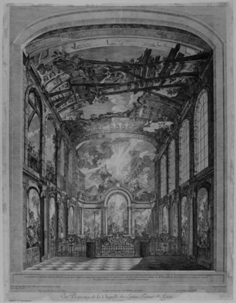 Vue perspective de la Chapelle des Enfants trouvés de Paris, 1769 Cette planche qui mesure H 0,767 m L 0,804 représente le chœur de l'église des Enfants Trouvés fermé d'une grille et sur les parois duquel se développe une décoration à la fois architecturale et pittoresque peinte par les Brunetti pour l'architecture et par Natoire pour la peinture. En avant de la grille se voient deux marches dont la plus élevée forme tablette par un évidement régnant dans toute sa longueur et limité par les bords de la marche elle même Au dessus de la plinthe de l'architecture figurée on lit à G à la pointe C Natoire Pinx et sur la plinthe elle même à G Peint par Brunetti Père et fils plus loin également à la pointe St Fessard Sculp La marche la plus élevée porte à la pointe à G Aug de S Aubin del et au burin sur l'espèce de tablette qu'elle forme : J'ai été contraint de rendre cette architecture telle qu'elle est peinte dans la Chapelle des Enfans trouvés ce qui paroit faire des contresens avec ce qui est de relief. Que l'on fasse attention que Mr Brunetti ont mis leur point de vue au milieu près la grille. Par ce moien l'On verra qu il ne m a pas été possible d'Eviter cet inconvénient. Sur la marche inférieure au burin à G Peint par Charles Natoire Peintre du Roy pour l'Histoire et par Mo Brunetti père et fils pour l'Architecture. Dessiné par Aug. de St Aubin à D Gravé par Et Fessard 1759 Plus B au M A Paris chès l auteur Graveur du Roy et de la Bibliothèque Rue de Richelieu Plus B dans la marge inférieure. Source : Catalogue de l'œuvre de A. de Saint-Aubin. Tableaux de la Chapelle des enfans trouvés de Paris peints par Charles-Joseph Natoire gravés par Étienne Fessard, Paris, 1756-1757. In folio max. contenant 15 planches — Une planche dessinée par Saint Aubin, fiche 575, page 172.